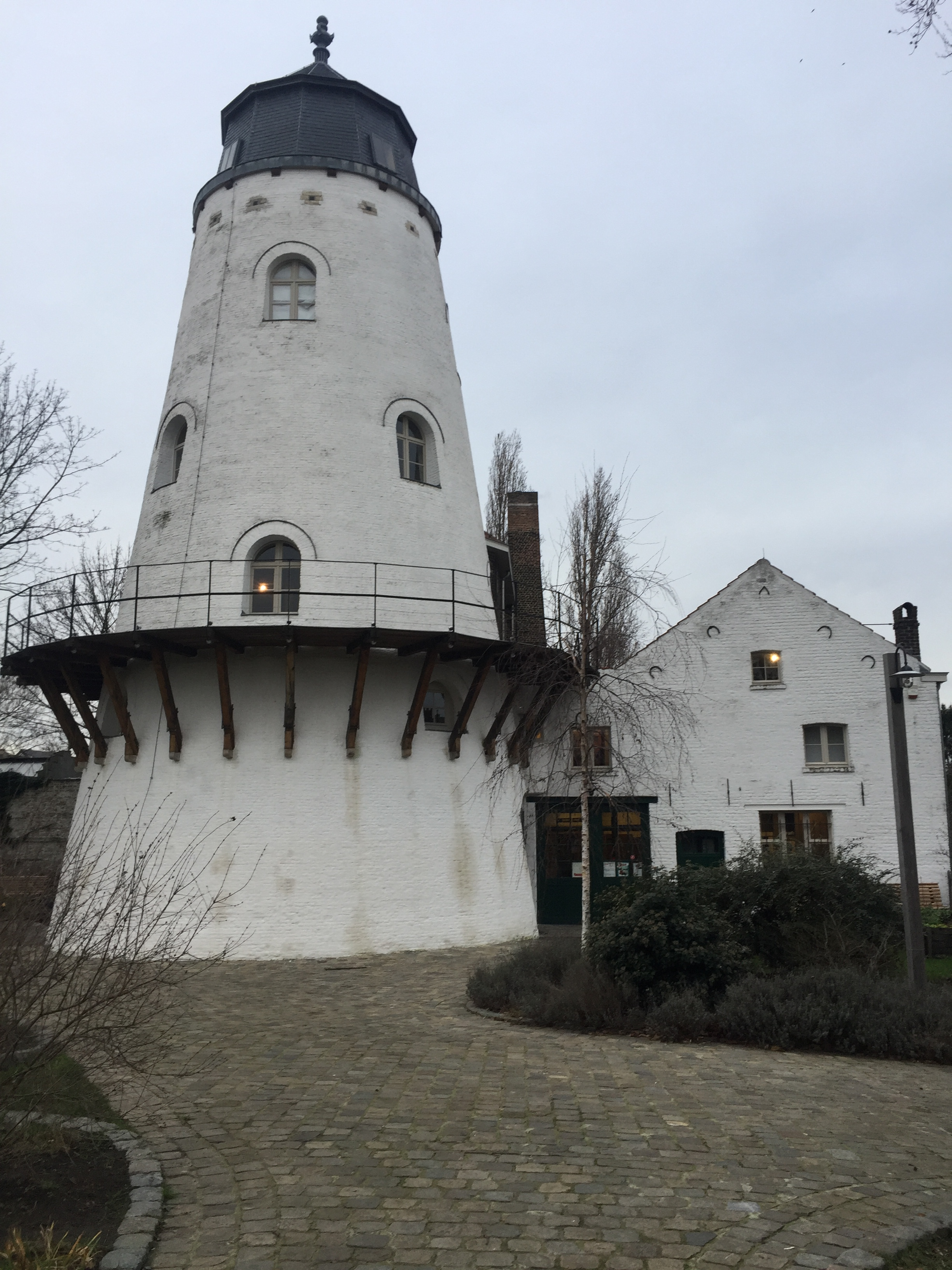 Musee bruxellois du moulin et de l'alimentation